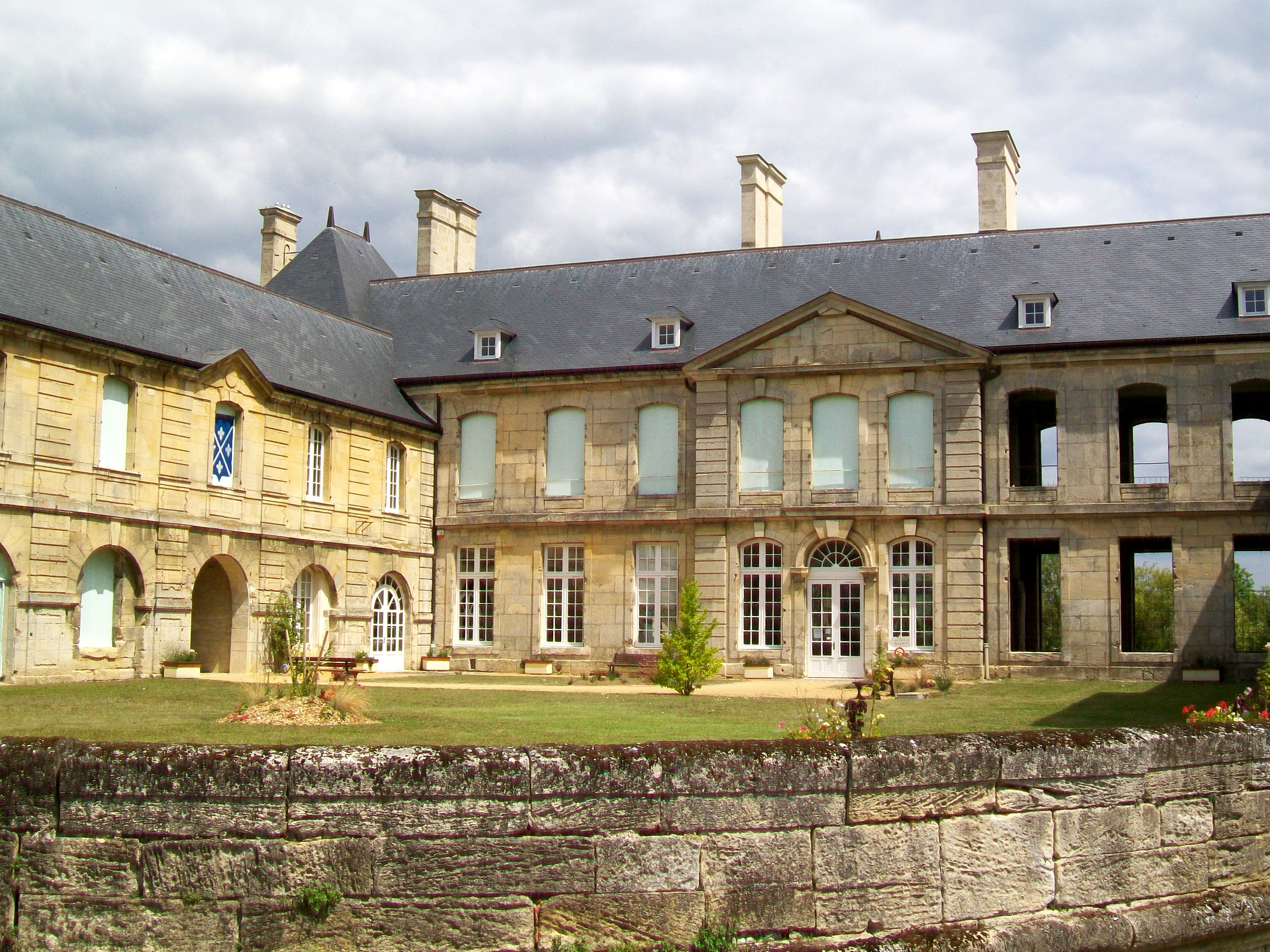 Vue rapprochée de l'aile centrale du château, avec la mairie (à gauche).